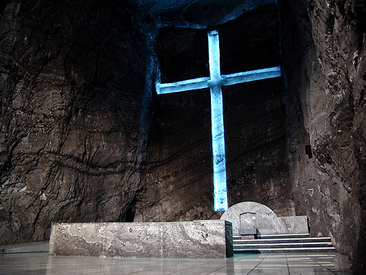 The Altar of the Salt Cathedral (Zipaquirá, Colombia) / Altar de la Catedral de Sal (Zipaquirá, Colombia).